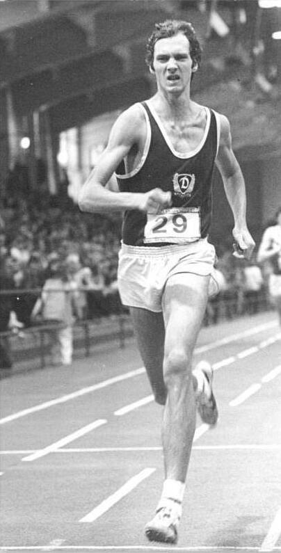 Detlev Wagenknecht ADN-ZB Weisflog 20.2.83 Bez. Cottbus: DDR-Hallenmeisterschaften der Leichtathleten in Senftenberg- Detlev Wagenknecht gewann den Titel über 800 m mit der DDR-Hallenbestleistung von 1:46,3 min.